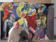 Der Künstler Karl Ludwig Sauer vor einem seiner Werke